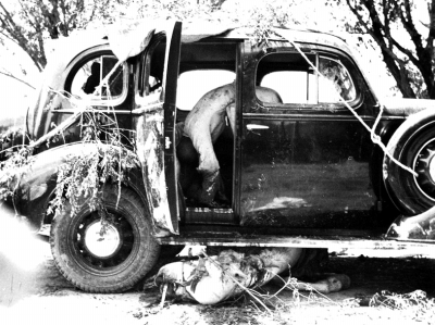 赵登禹将军殉国时乘坐的汽车